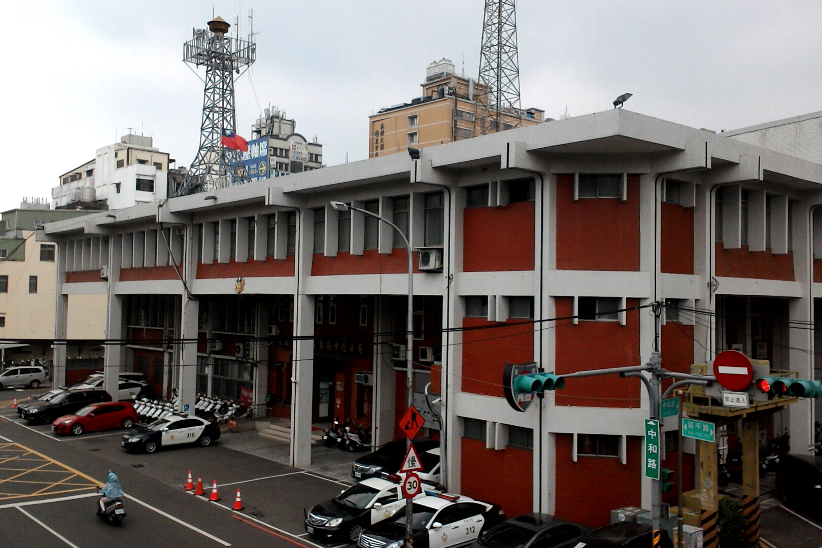 桃園市政府警察局中壢分局，位於桃園市中壢區延平路607號。